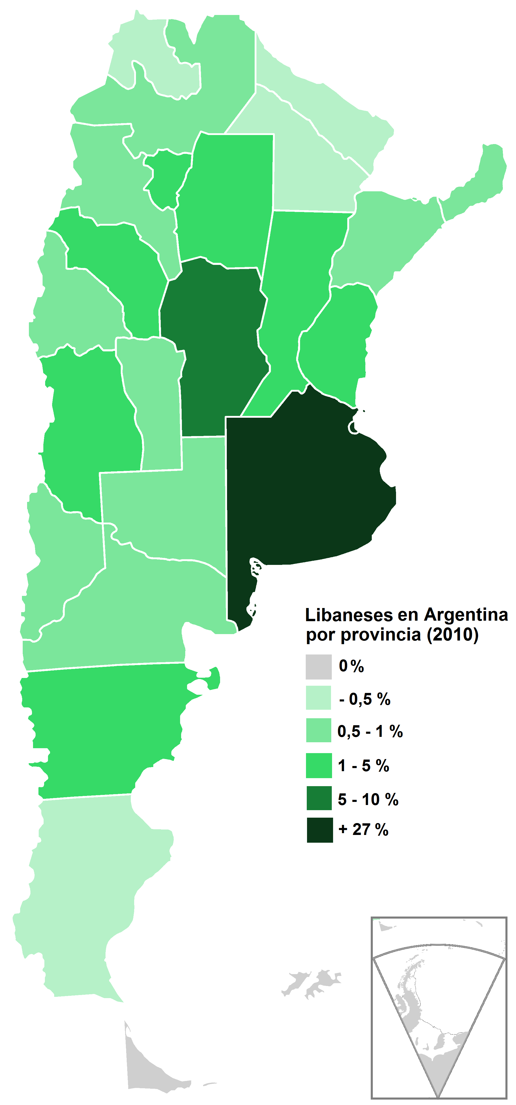 República Argentina por provincia. Población nacida en Líbano, en porcentaje. Año 2010. Fuente: Censo 2010 - INDEC.